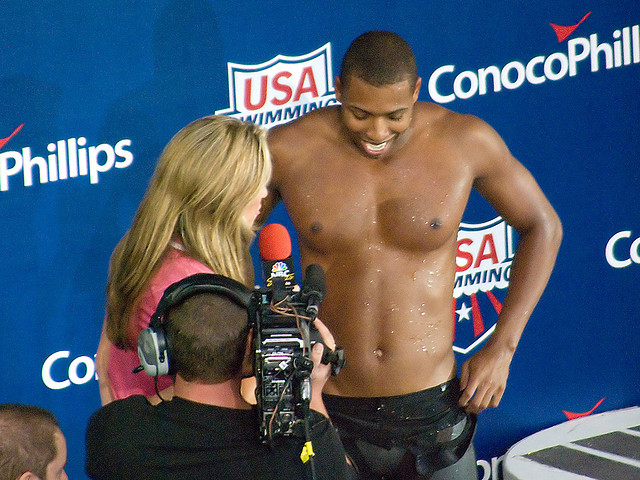 Cullen Jones